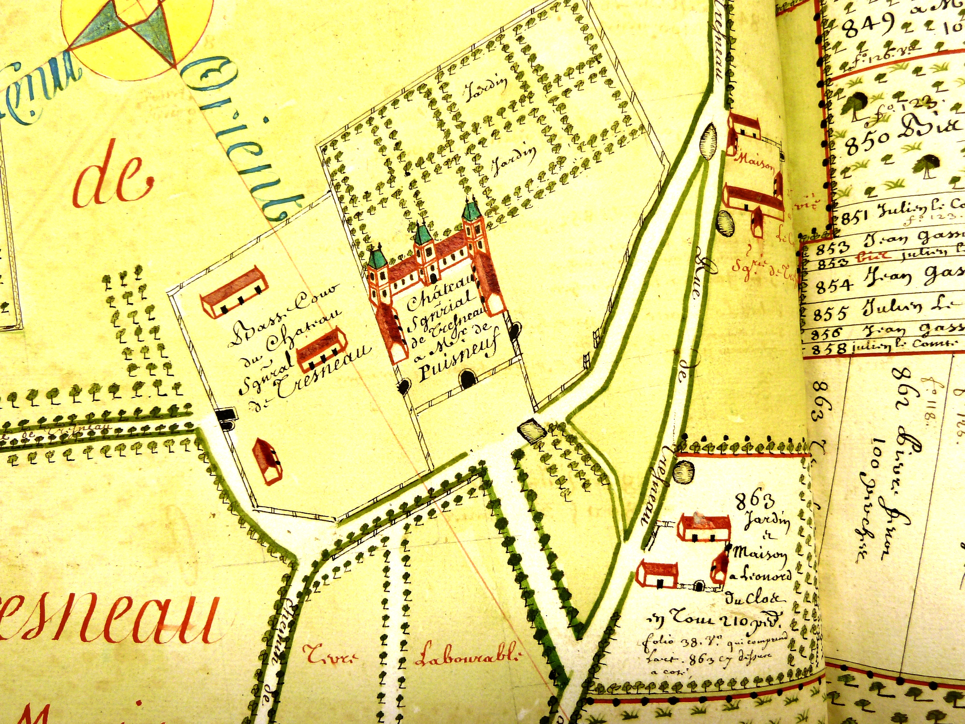 Extrait de l'Atlas de Pontcarré (plans de la seigneurie d'Arpentigny) centré sur le château de Tresneau (entre 1722 et 1743)